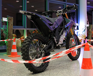 ElMo